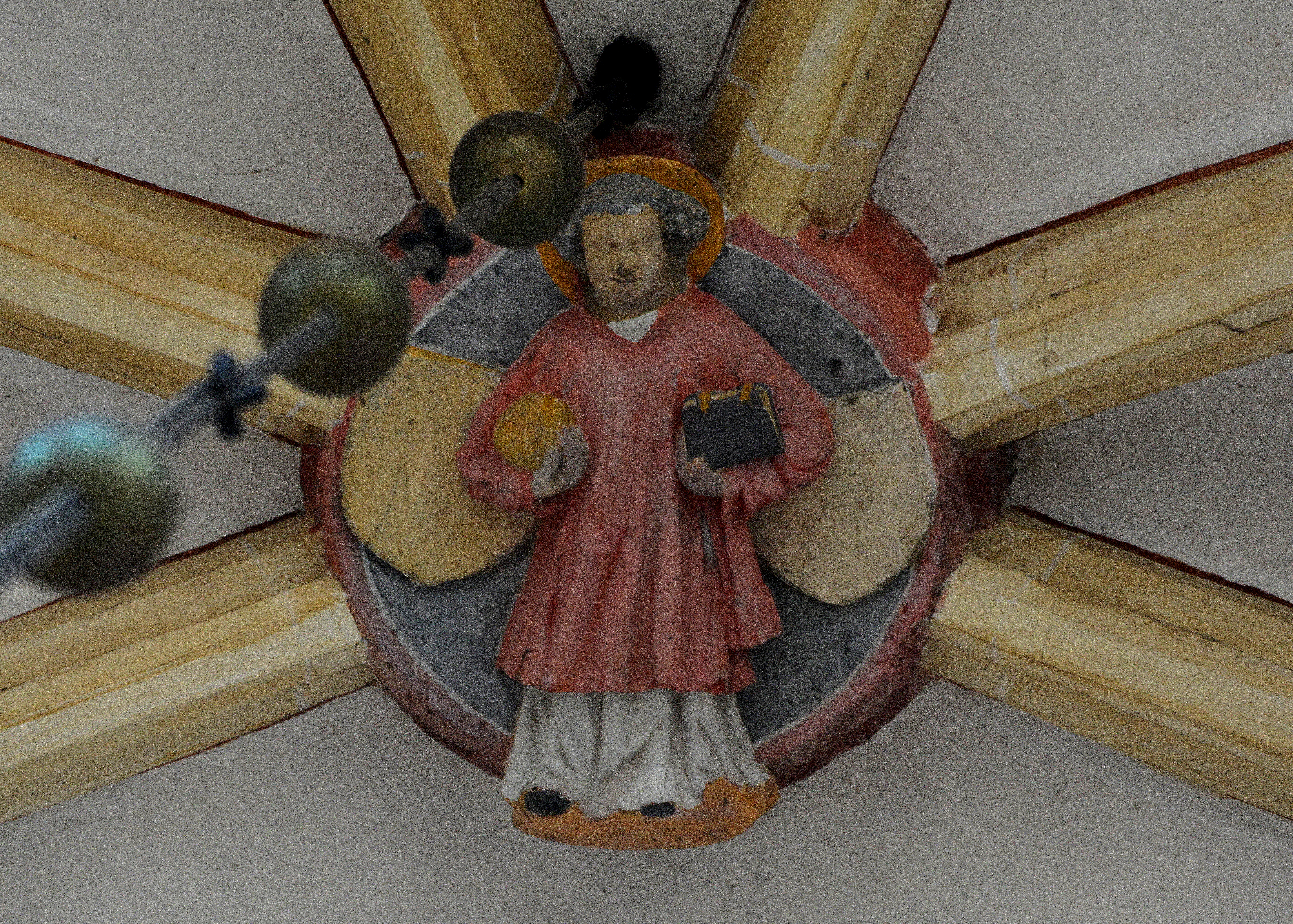 Hasselt, Stefanuskerk, sluitsteen van Stefanus